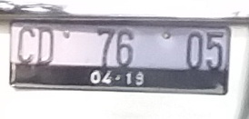 Diplomatenkennzeichen Indonesien